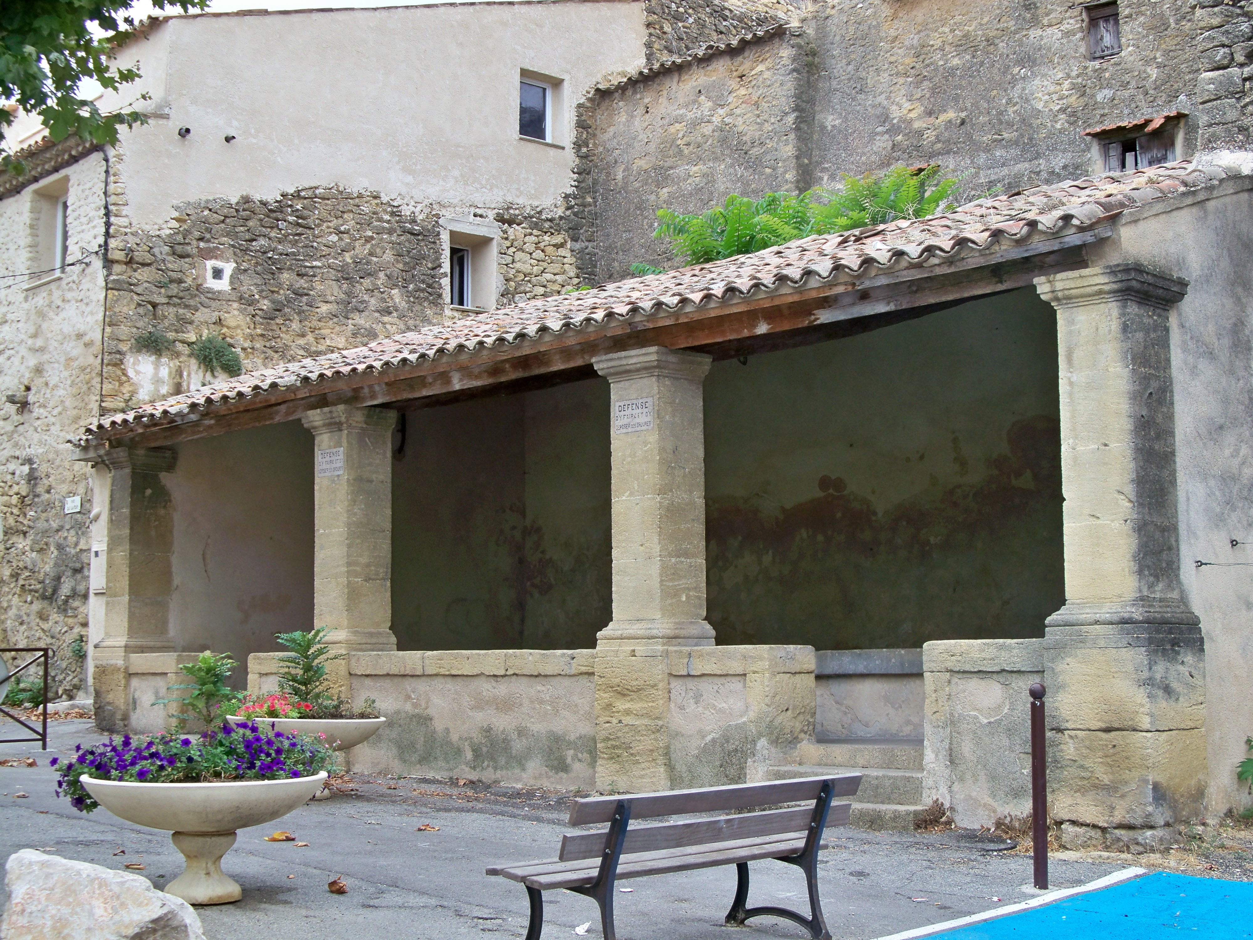 Lavoir public à Lauris, Vaucluse, France